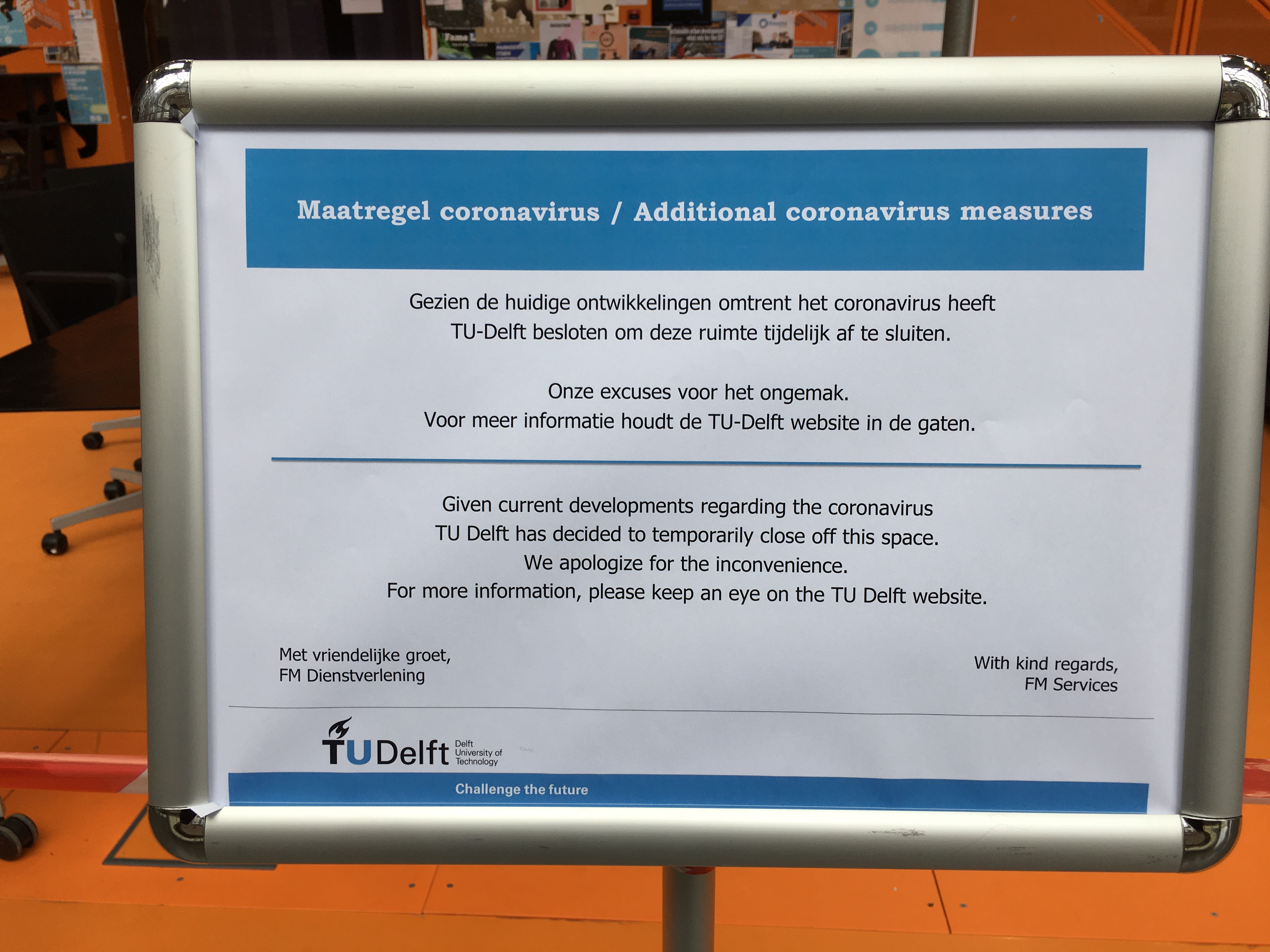 Afsluiten van de faculteit Bouwkunde van de TU Delft